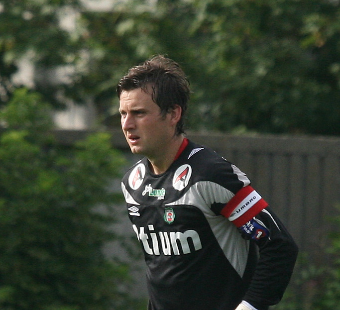 Roger Eskeland, Bryne